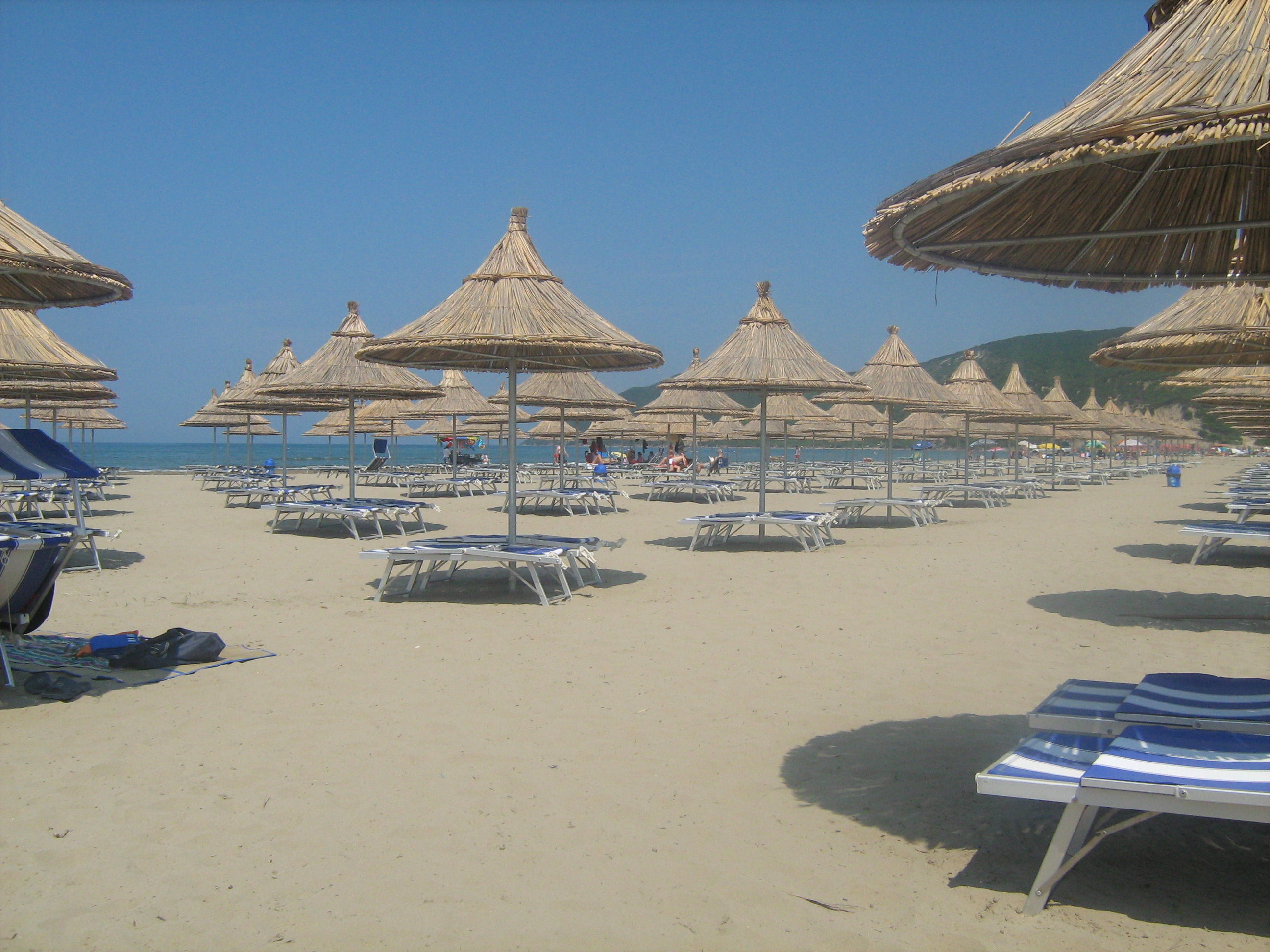 GJIRI I LALZIT